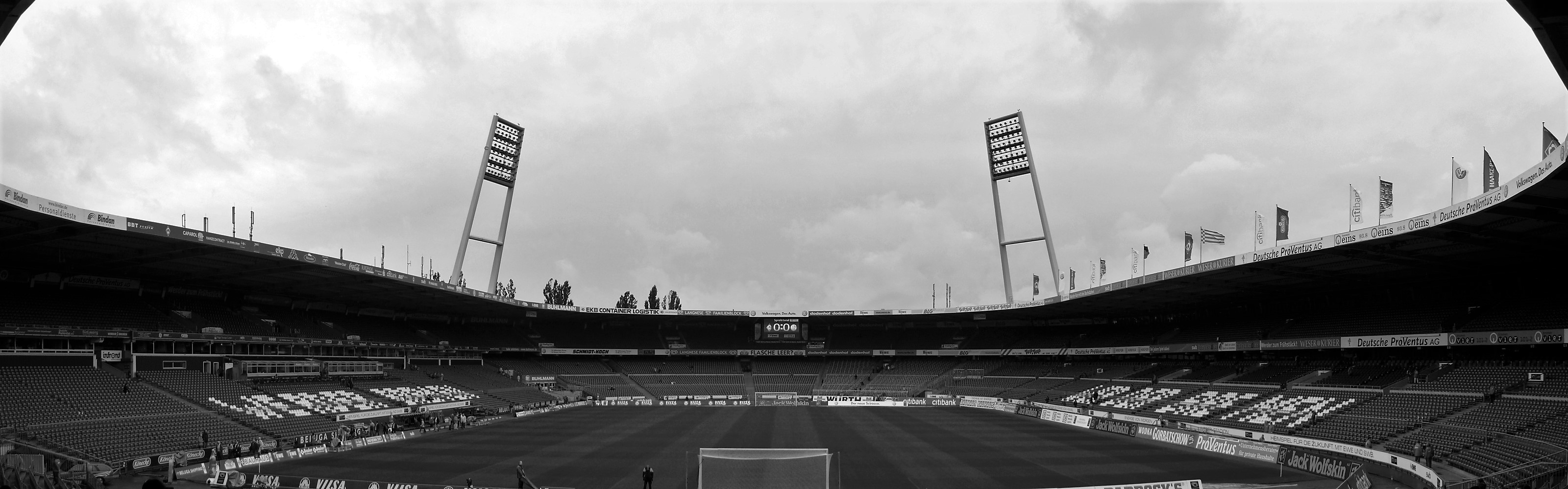 Innenraum des Weserstadions in Bremen ("Panorama aus 8 Einzelbildern).